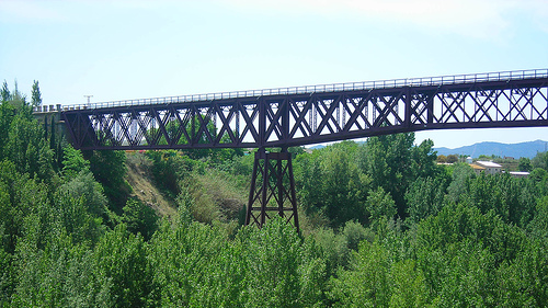 Puente de Lata, en el municipio de Dúrcal (Granada, España)